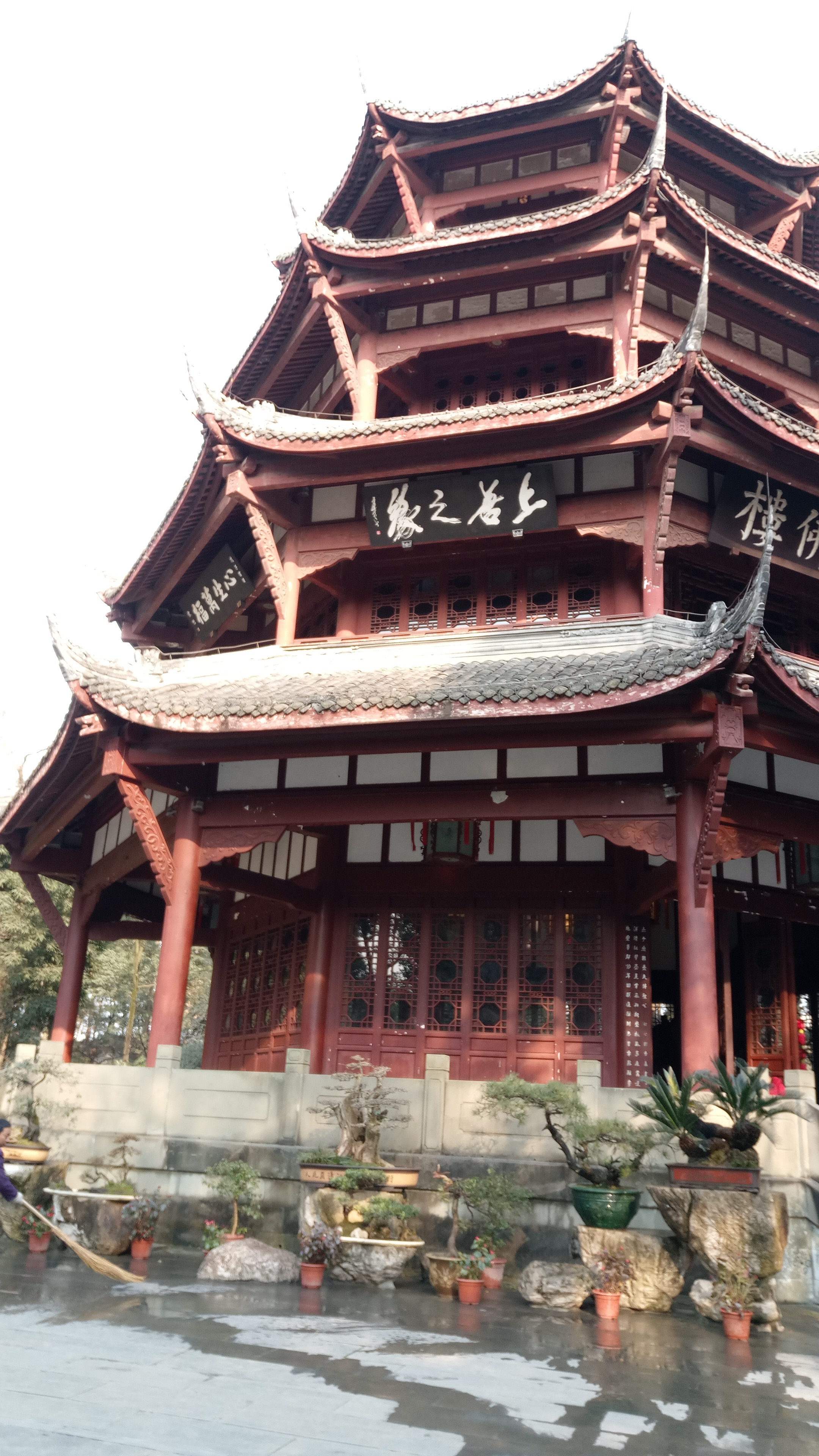 中文（中国大陆）: 位于杜甫草堂的万佛楼（重建于2003年）